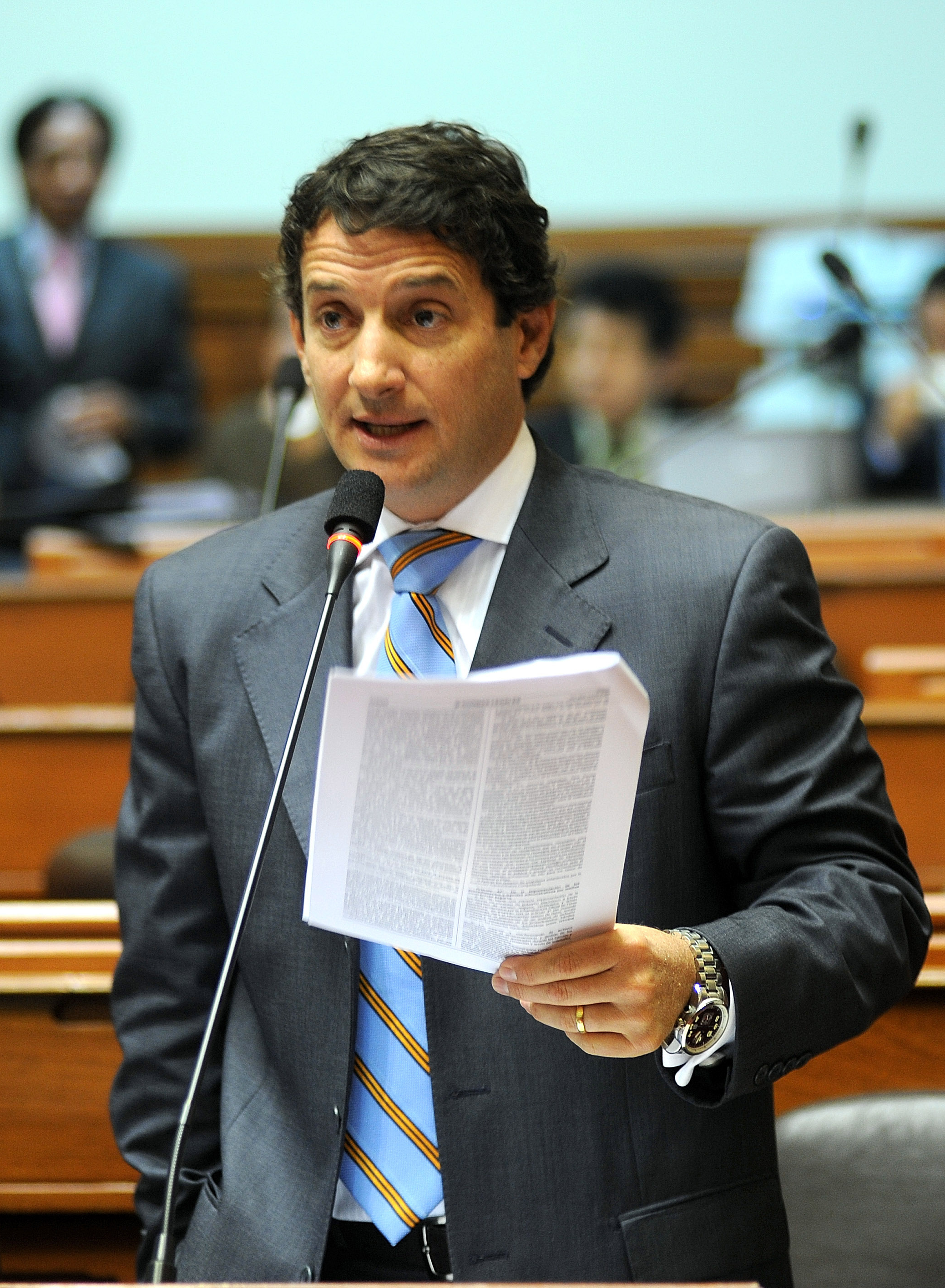 El legislador Renzo Reggiardo expresa su posición en el debate parlamentario realizado esta mañana por el Pleno congresal.